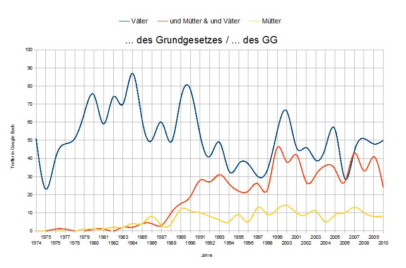 Abfrage aus Google Buch zu "Väter / Väter und Mütter & Mütter und Väter / Mütter // des Grundgesetzes / des GG" Ab 1948 sprach man von den "Vätern (Gründungsvätern / Verfassungsvätern) des Grundgesetzes". Neben den 61 Männern waren auch 4 Frauen anwesend. Über die "Mütter des Grundgesetzes" sprach man aber erst viel später, als die Frauenbewegung wieder aufkam."Die Fixierung der G. in Art. 3 Abs. 2 GG ist ein Erfolg der wenigen „Mütter des Grundgesetzes", allen voran der SPD-Politikerin Elisabeth Selbert."Beispiele von besonderen Schreibungen, die auch enthalten sind: "Väter" des Grundgesetzes Väter (und Mütter) des Grundgesetzes "Vätern" (und Müttern) des Grundgesetzes Gründungsvätern (und Müttern) des Grundgesetzes Verfassungsväter und -mütter des Grundgesetzes Vätern (und Müttern) des Grundgesetzes Väter (und Mütter) des GG Als die vielen „Väter“ und wenigen „Mütter“ des Grundgesetzes ... (zählt bei Nur-Mütter, aber solche Sonderkonstruktionen sind sehr selten.)